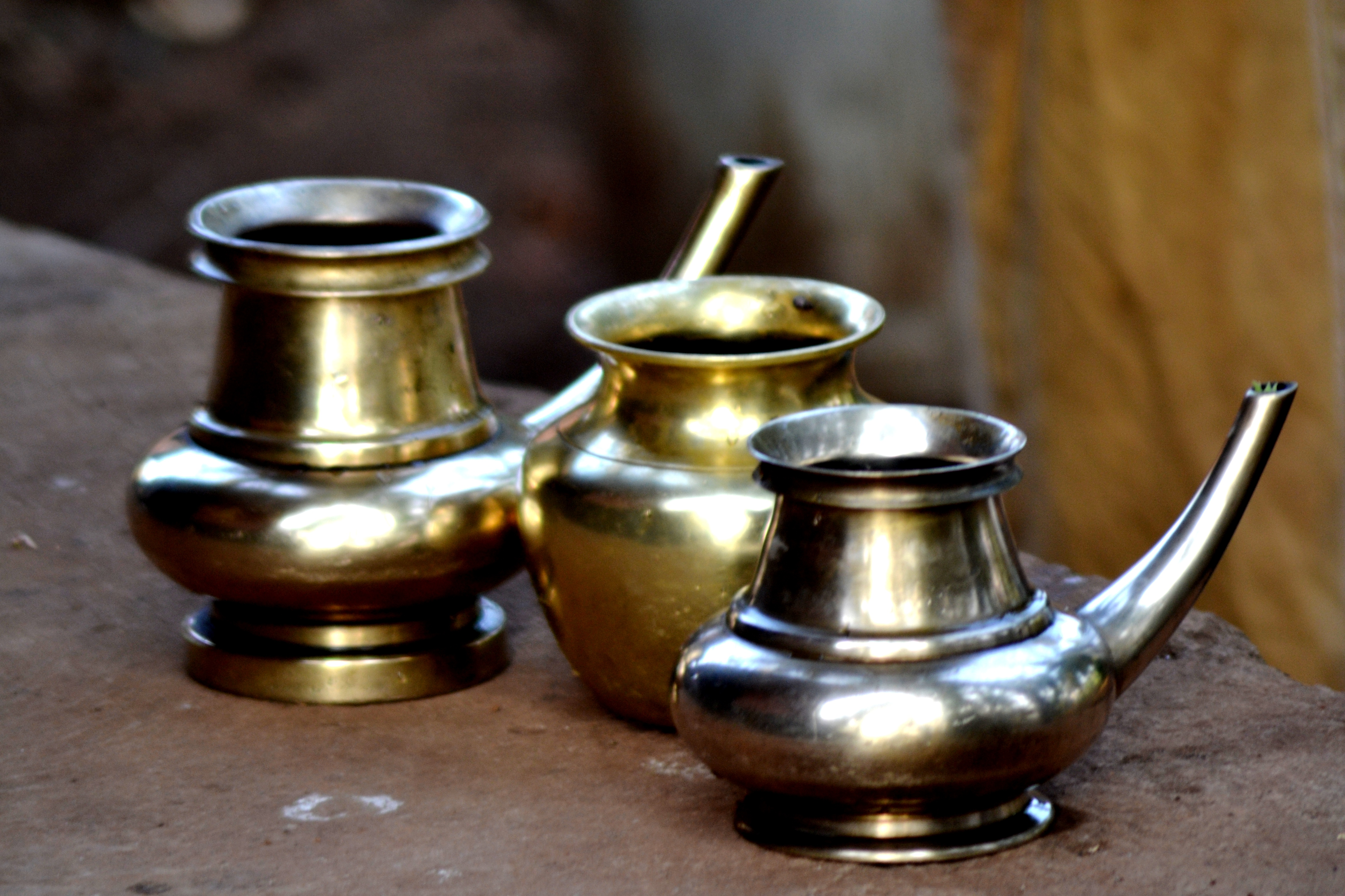 വിവിധ ഇനം കിണ്ടികള്‍